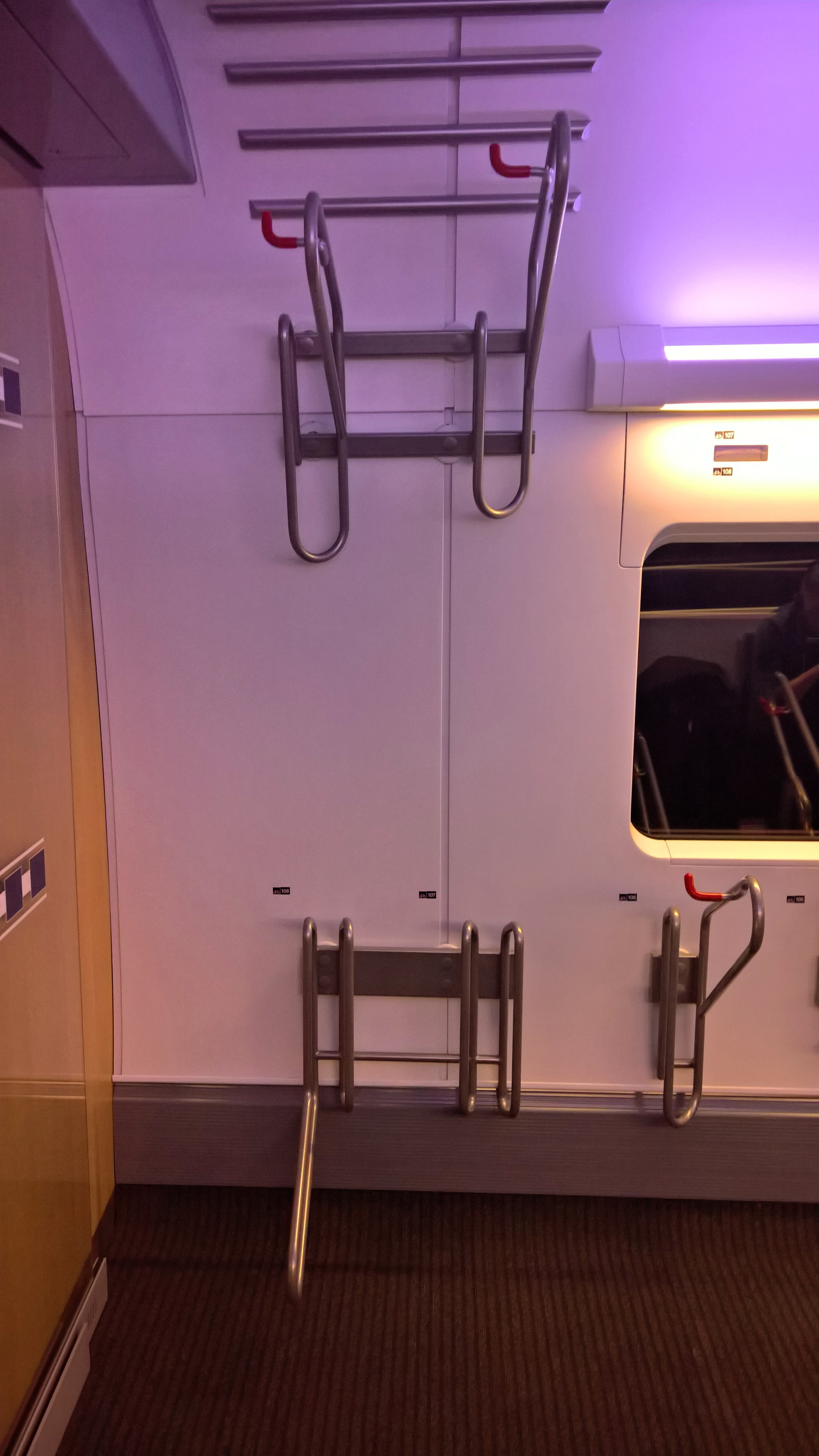 ICE 4 Abteil für Räder 2018